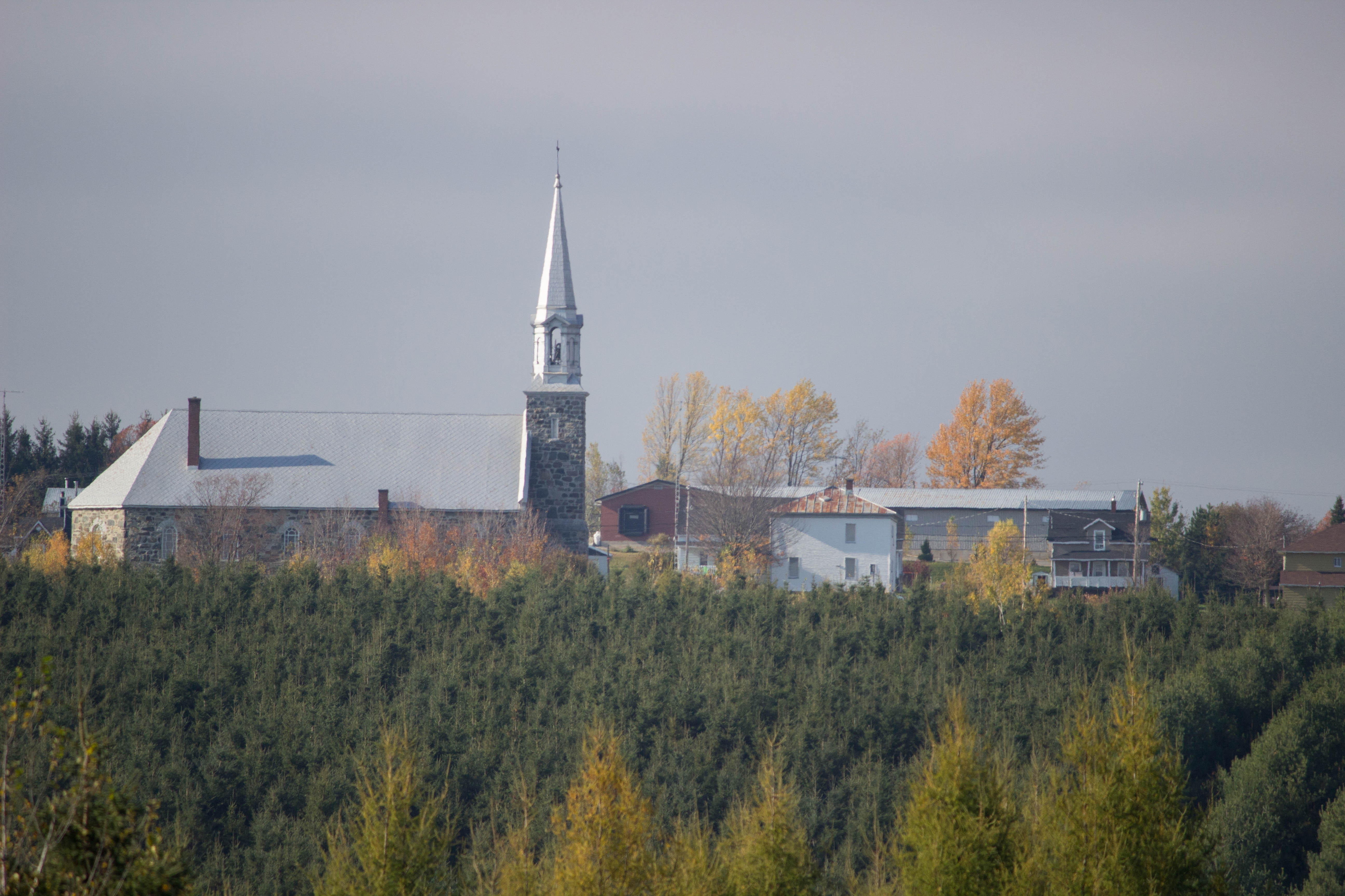 Saint-Alfred vue depuis le rang St-Étienne